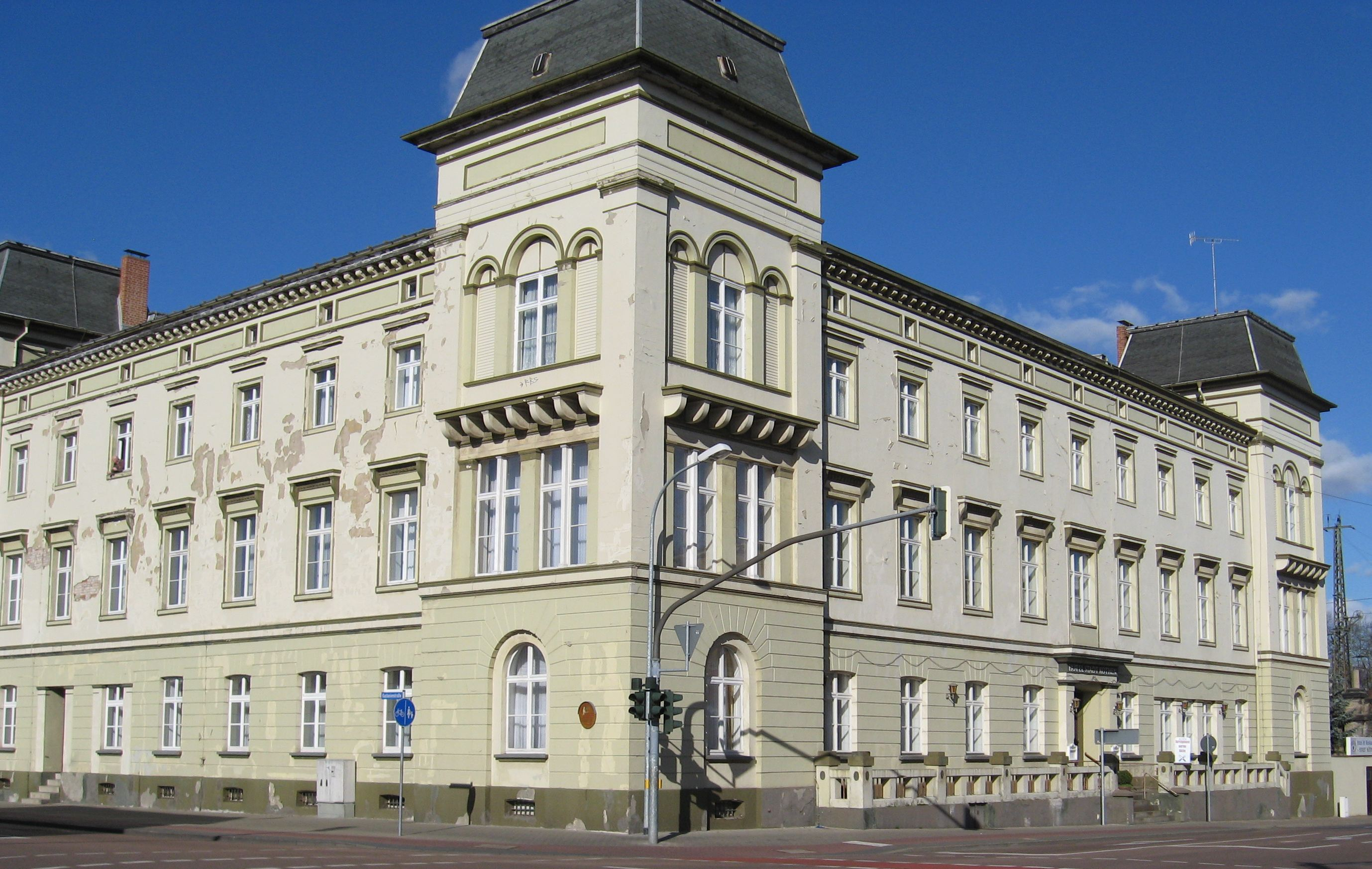 Das Bahnhofshotel/Hotel Stadt Köthen in Köthen (Anhalt) an der Kreuzung zwischen Kastanienstraße und Friedrich-Ebert-Straße. - OpenStreetMap(Info)